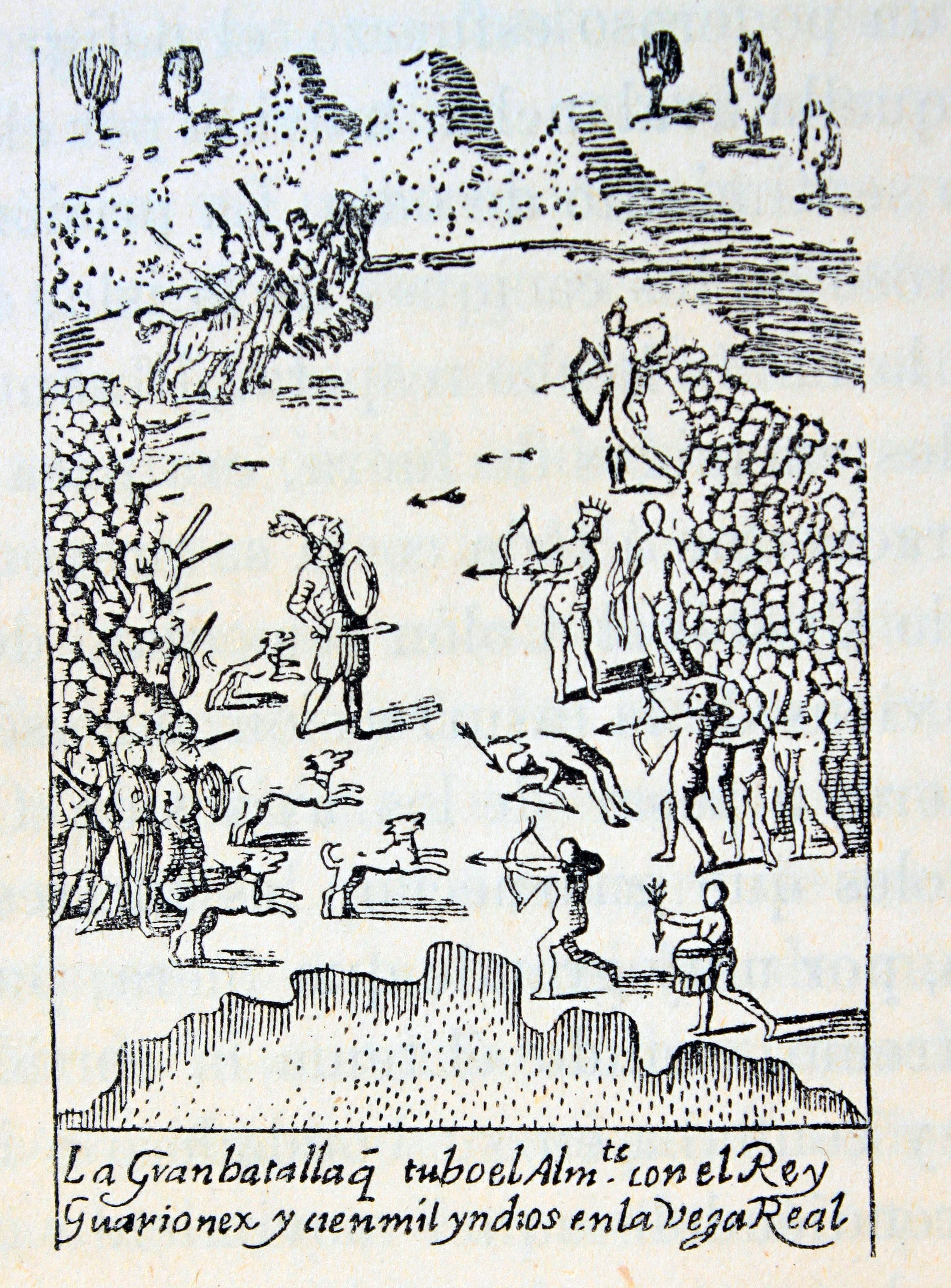 Ilustraciones de la obra : Cristóbal Colón : historia del descubrimiento de América / por Francisco Serrato ; con un prólogo de Roque Chabas. - Madrid : El Progreso Editorial, 1893